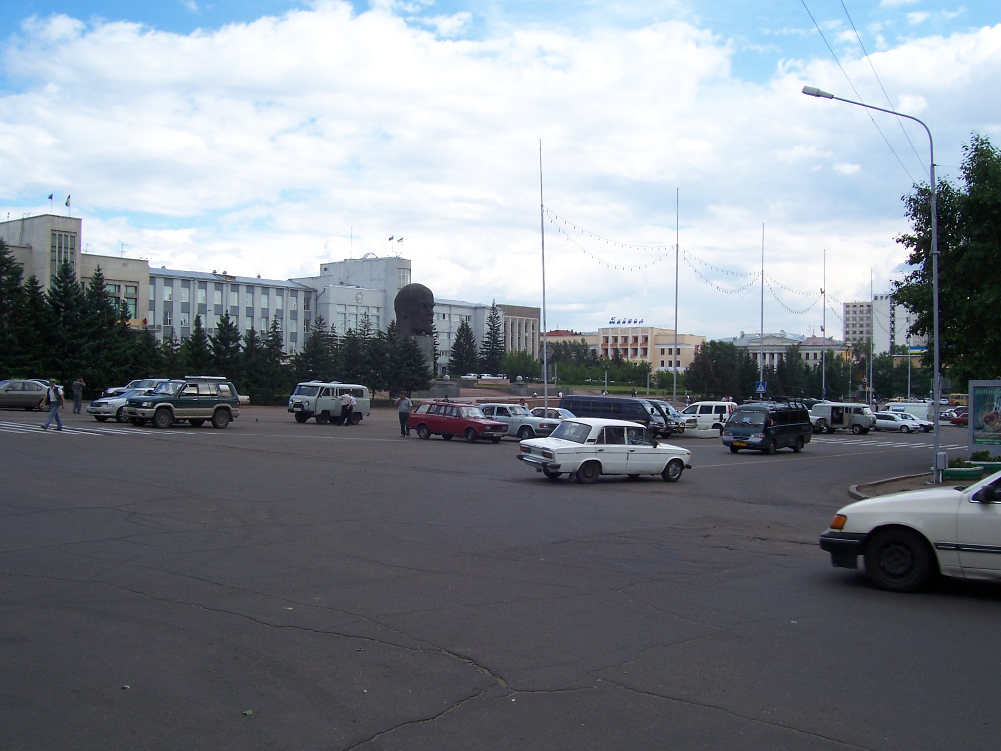 zelf gemaakt